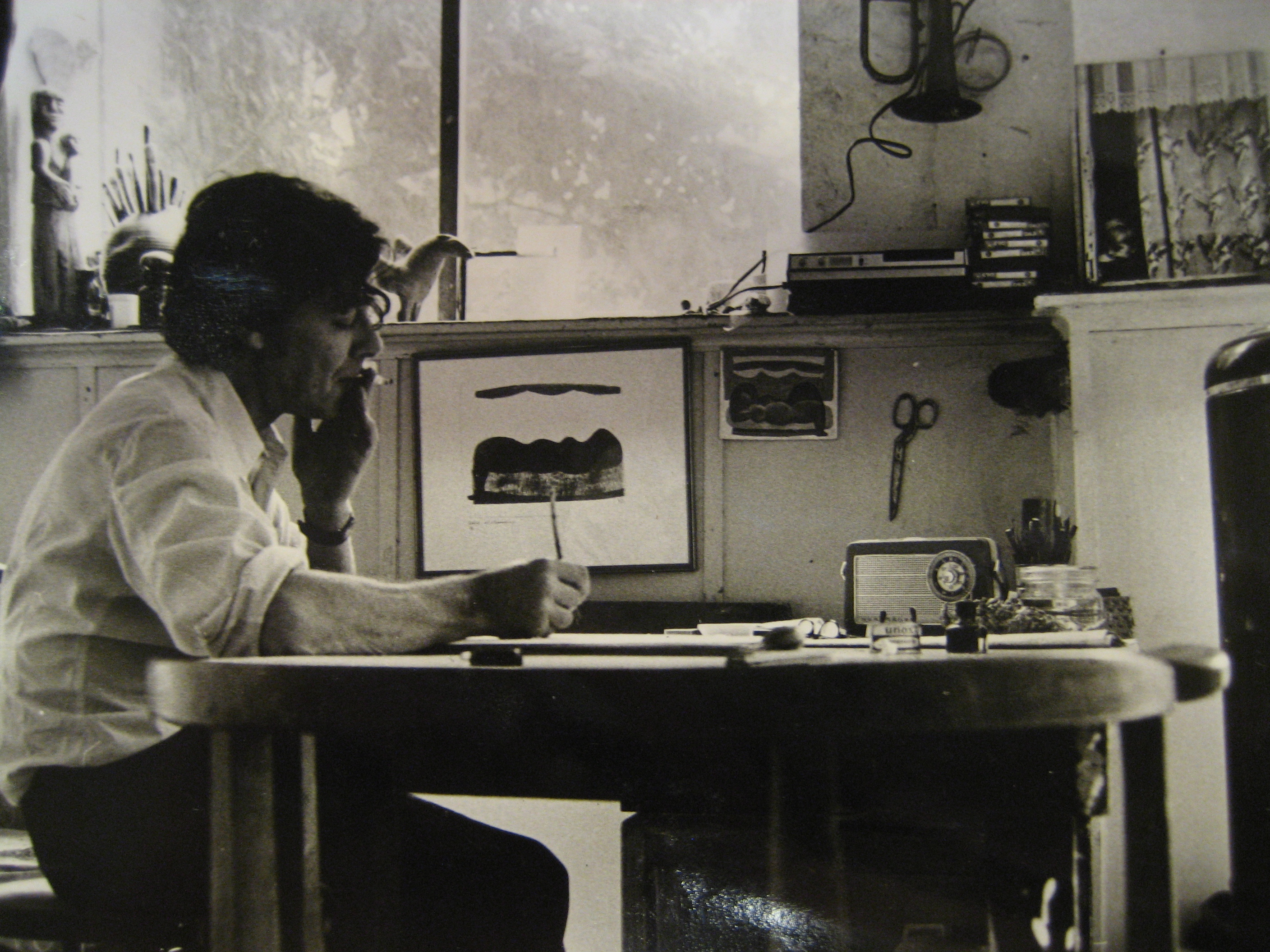 Ed van Teeseling in zijn atelier aan de Lange Brouwerstraat, Nijmegen, jaren '70.